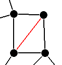 Ein erläuterndes Bild zum einem Beweis von Eulers Polyedersatz